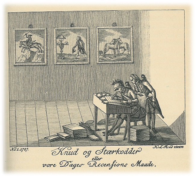 Knud og Stærkodder eller vore Dages Recensions Maade. Satirisk kobberstik fra 1787. Chr. H. Pram og Knud Lyne Rahbek, redaktørerne af ugeskriftet Minerva (symboliseret ved uglerne på deres skuldre og hjelmen på den enes hoved). Pram havde udgivet digtet "Stærkodder" og Rahbek anmeldte det favorabelt i deres fælles tidsskrift. Billederne i baggrunden hentyder til bladets indhold. Nærmere beskrivelse og kildehenvisning findes i Frederik C. Krohn, Fortegnelse over Danske Kobberstik, Raderinger, Illustrationer m.m., 1889 (1962), nr. 1743.